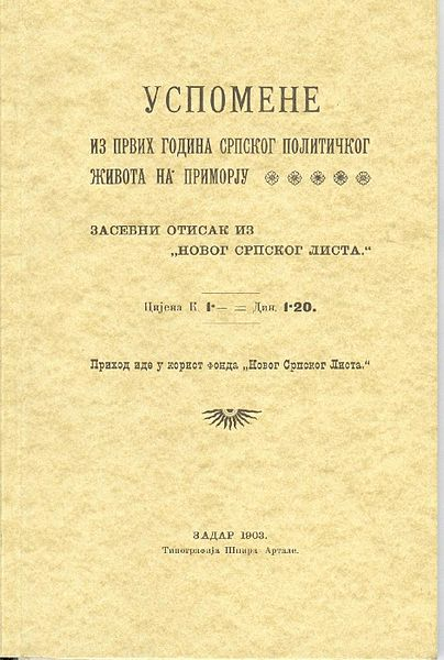 Никодим Милаш: Успомене из првих година српског политичког живота на приморју, Задар 1903.